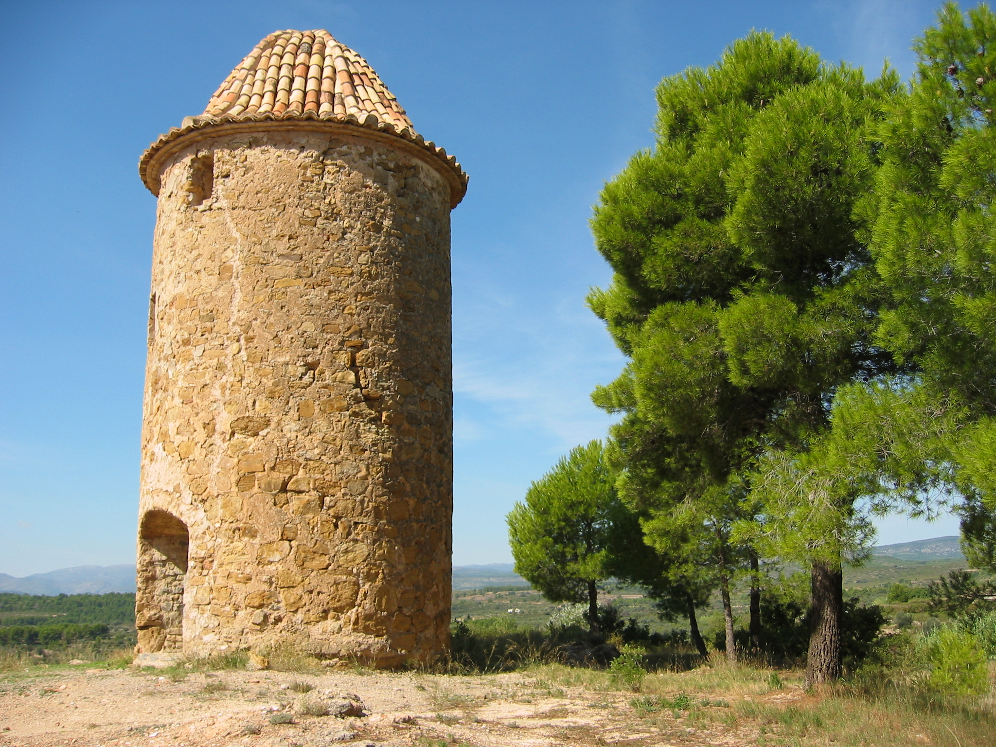 Torre de Anibal en Caudiel